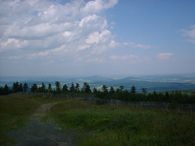 Blick vom Fichtelberg nach Norden